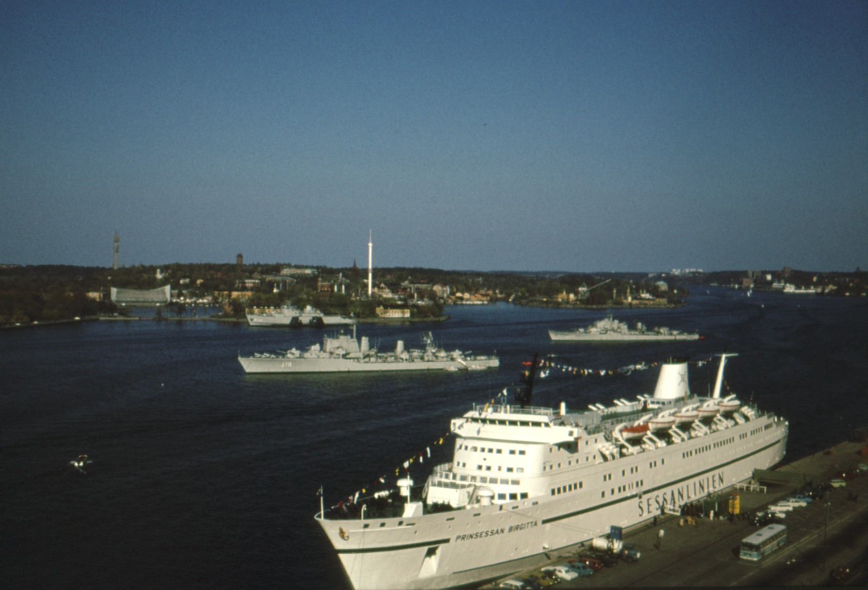 M/S Prinsessan Birgitta vid Stadsgårdskajen i Stockholm. Jagarna Halland och Östergötland på Saltsjön, och ett minfartyg (Älvsborg?) vid kapellholmen.